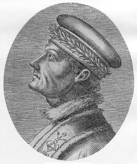 Francesco Filelfo (1398–1481), italienischer Humanist. Anoymer Stich